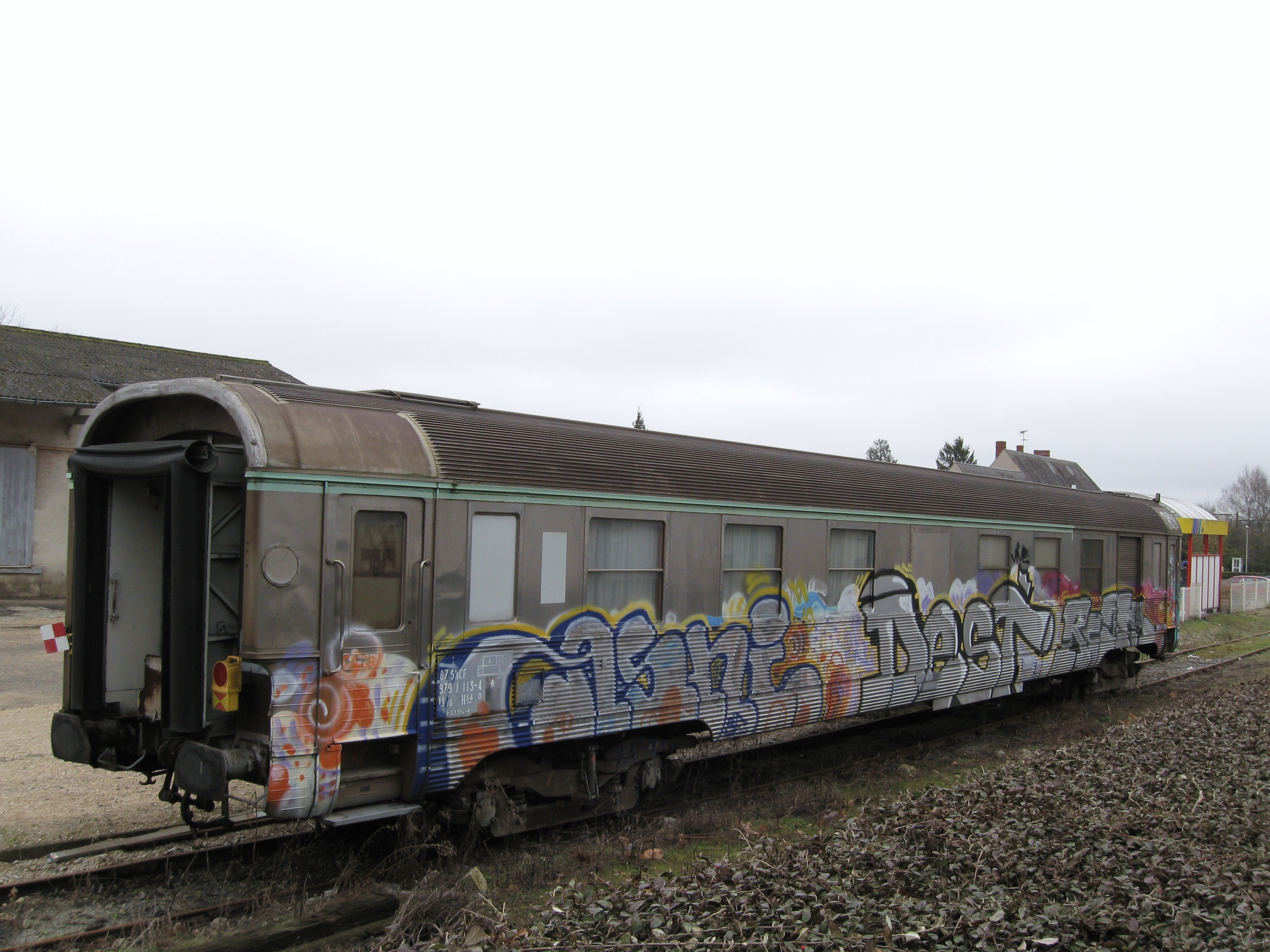 Voiture DEV Inox de la SNCF hors service sur une voie de garage de la gare de Lamotte-Beuvron (Loir-et-Cher, France).